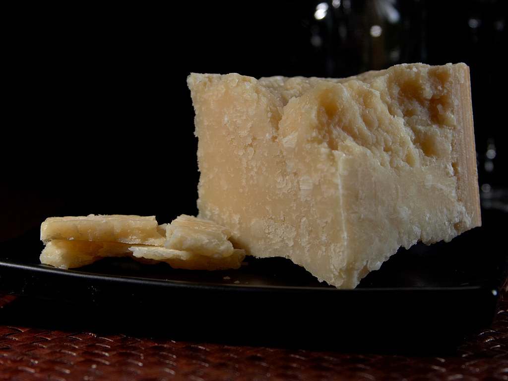 Parmesan Cheese (or more accurately, Parmigiano-Reggiano cheese)